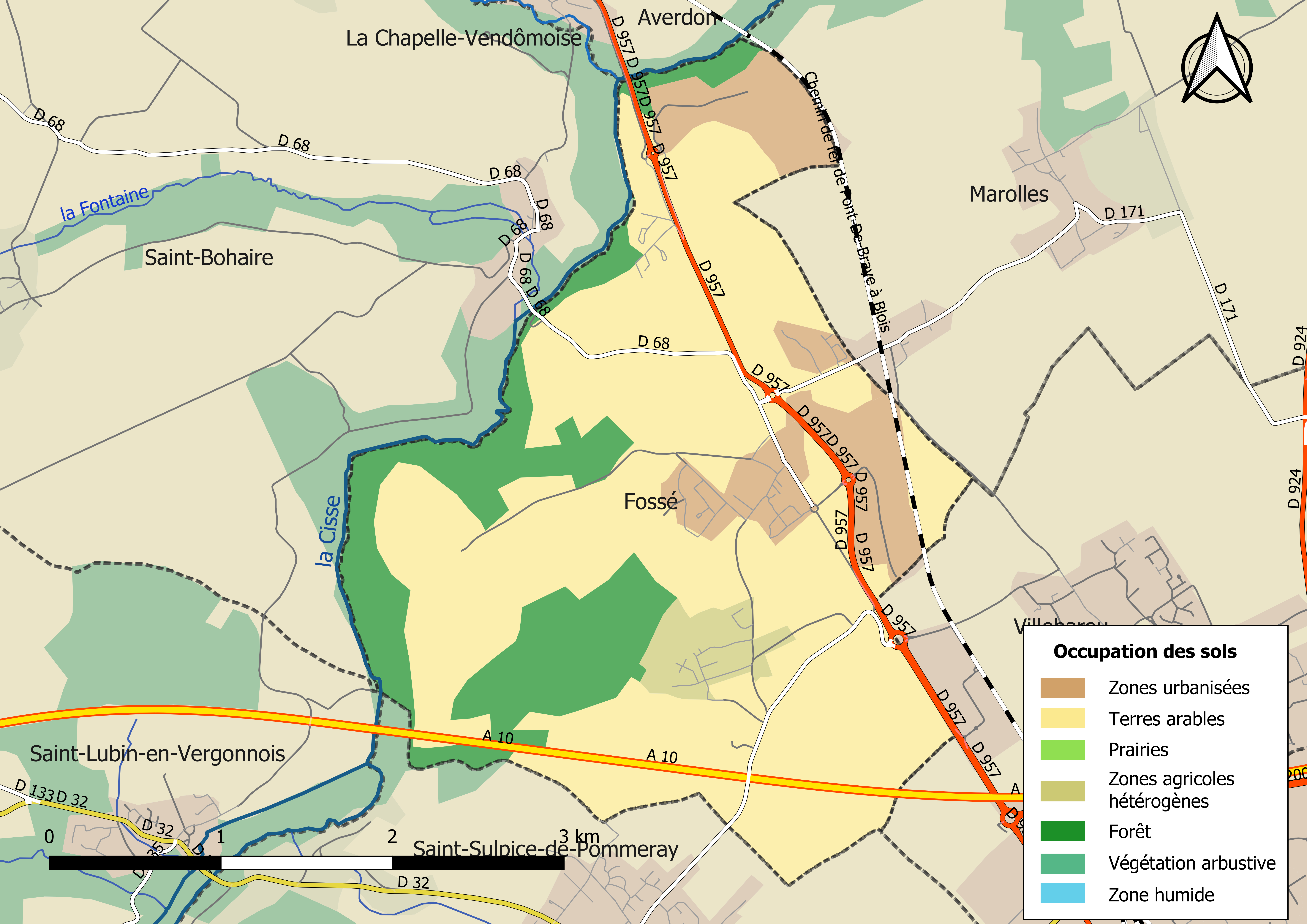 Carte des infrastructures et de l’occupation des sols en 2018 de la commune de Fossé (Loir-et-Cher) (France).